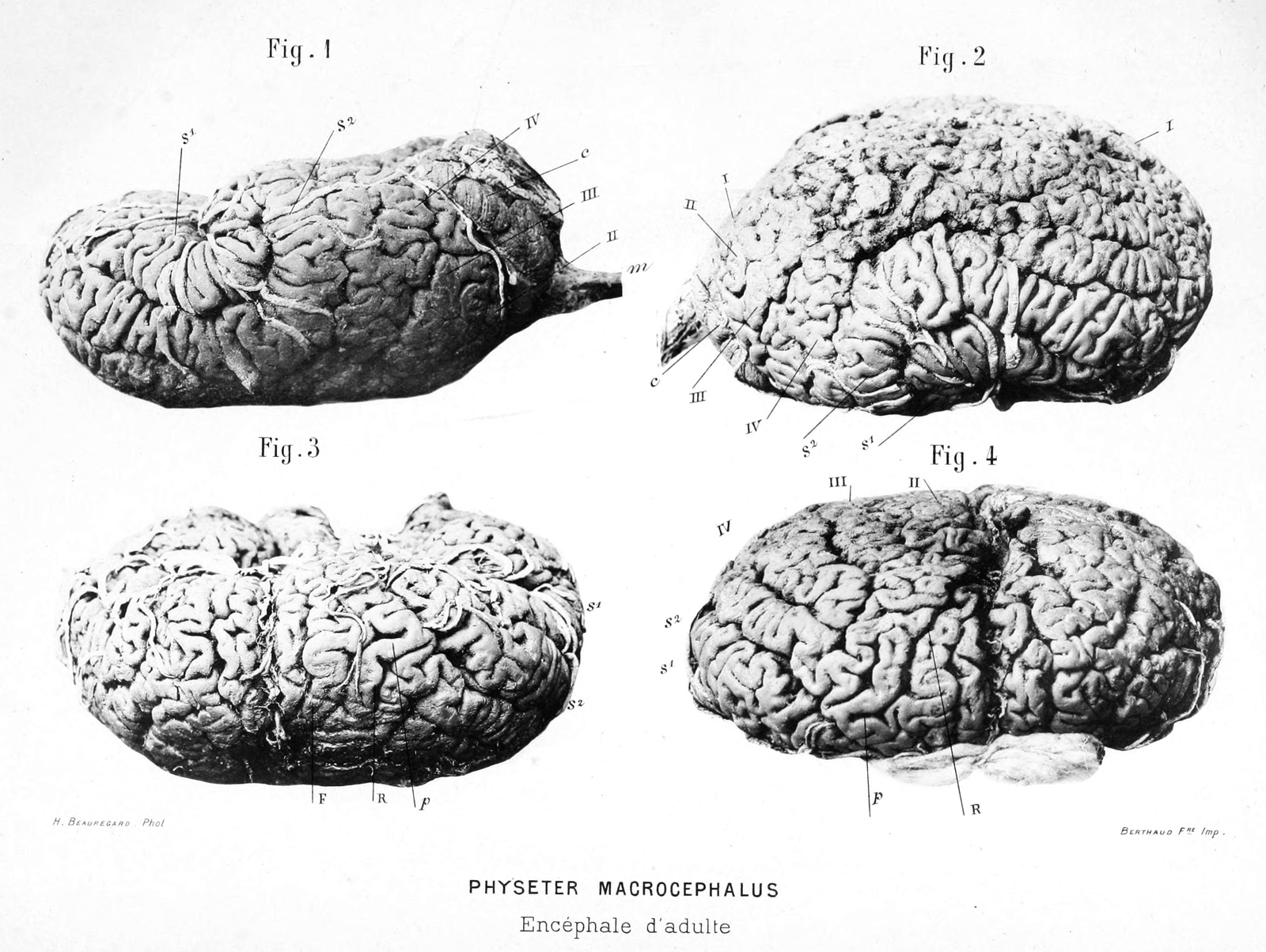 Encéphale adulte